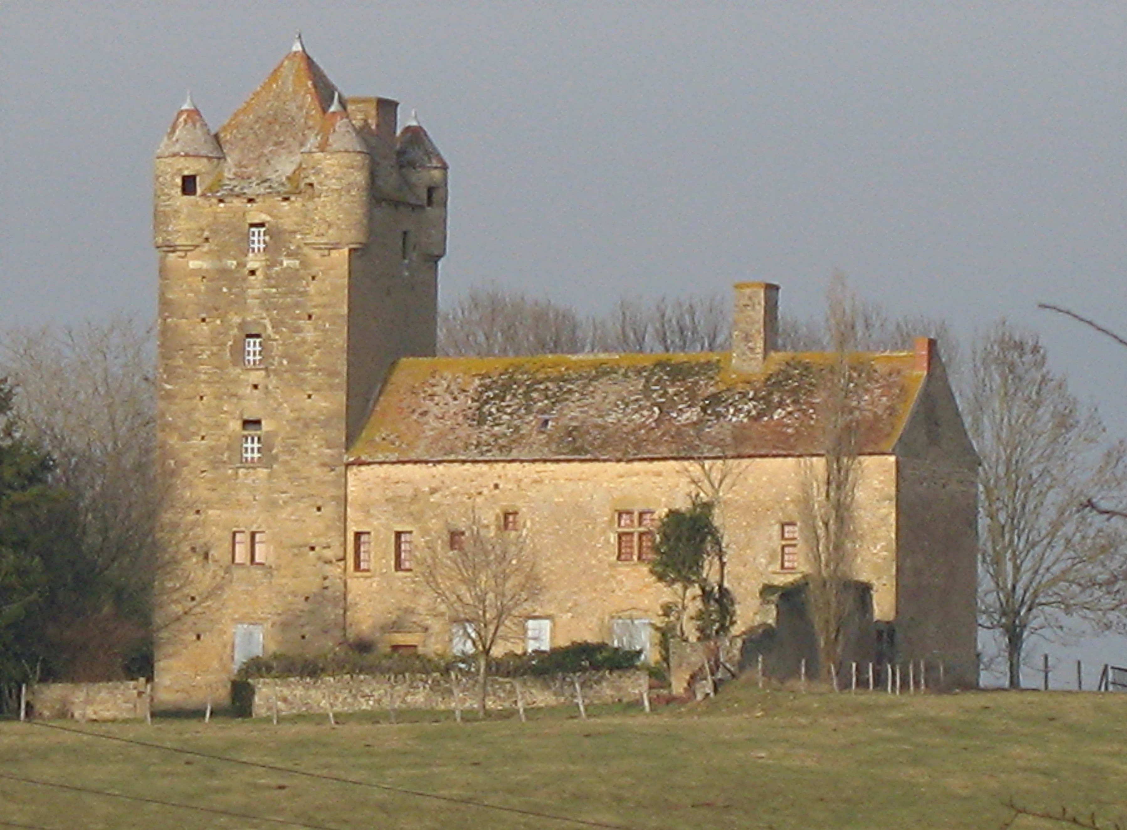 château de Montessus - Changy (Saône-et-Loire)